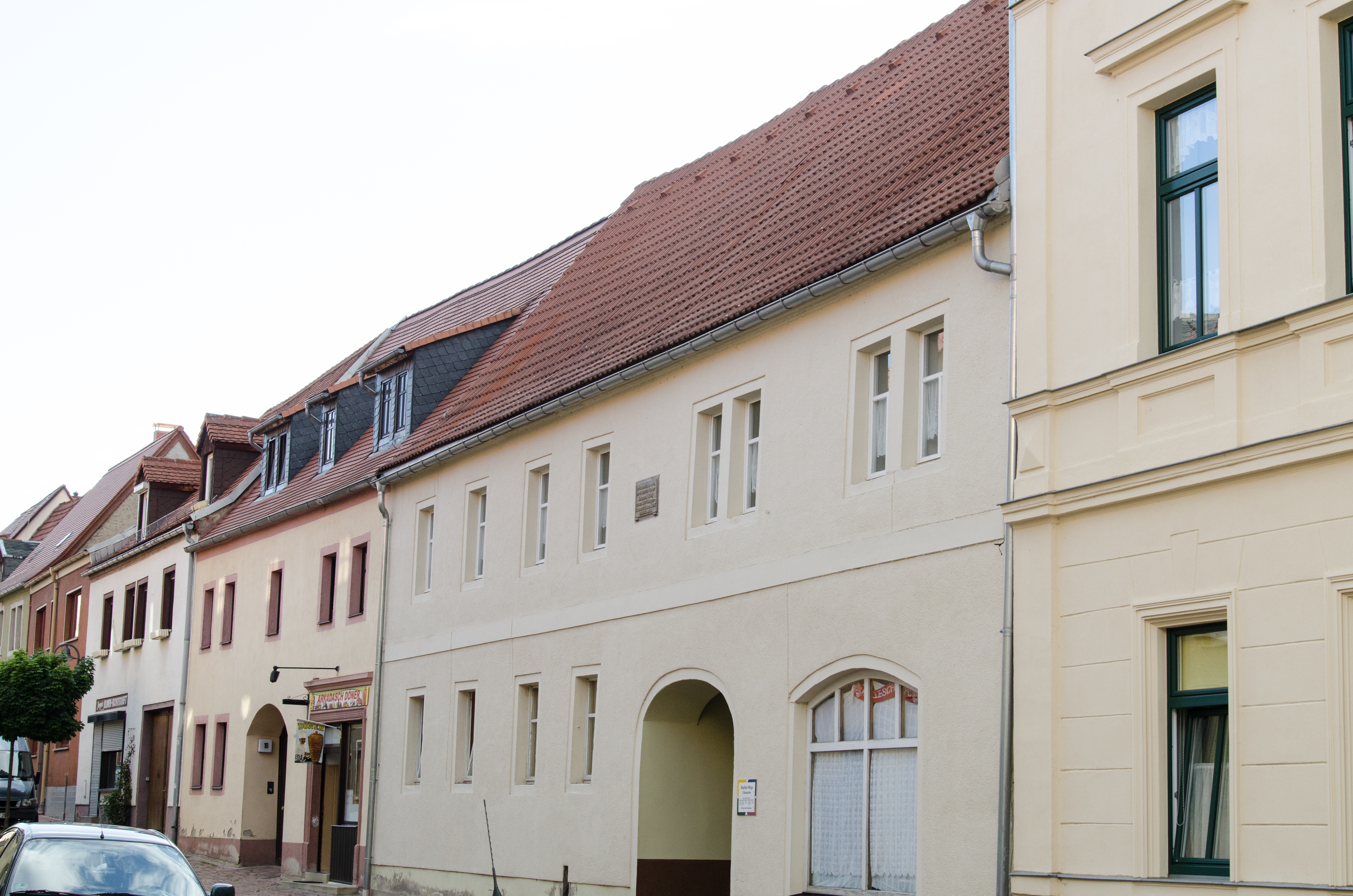 Querfurt, Lederberg 16